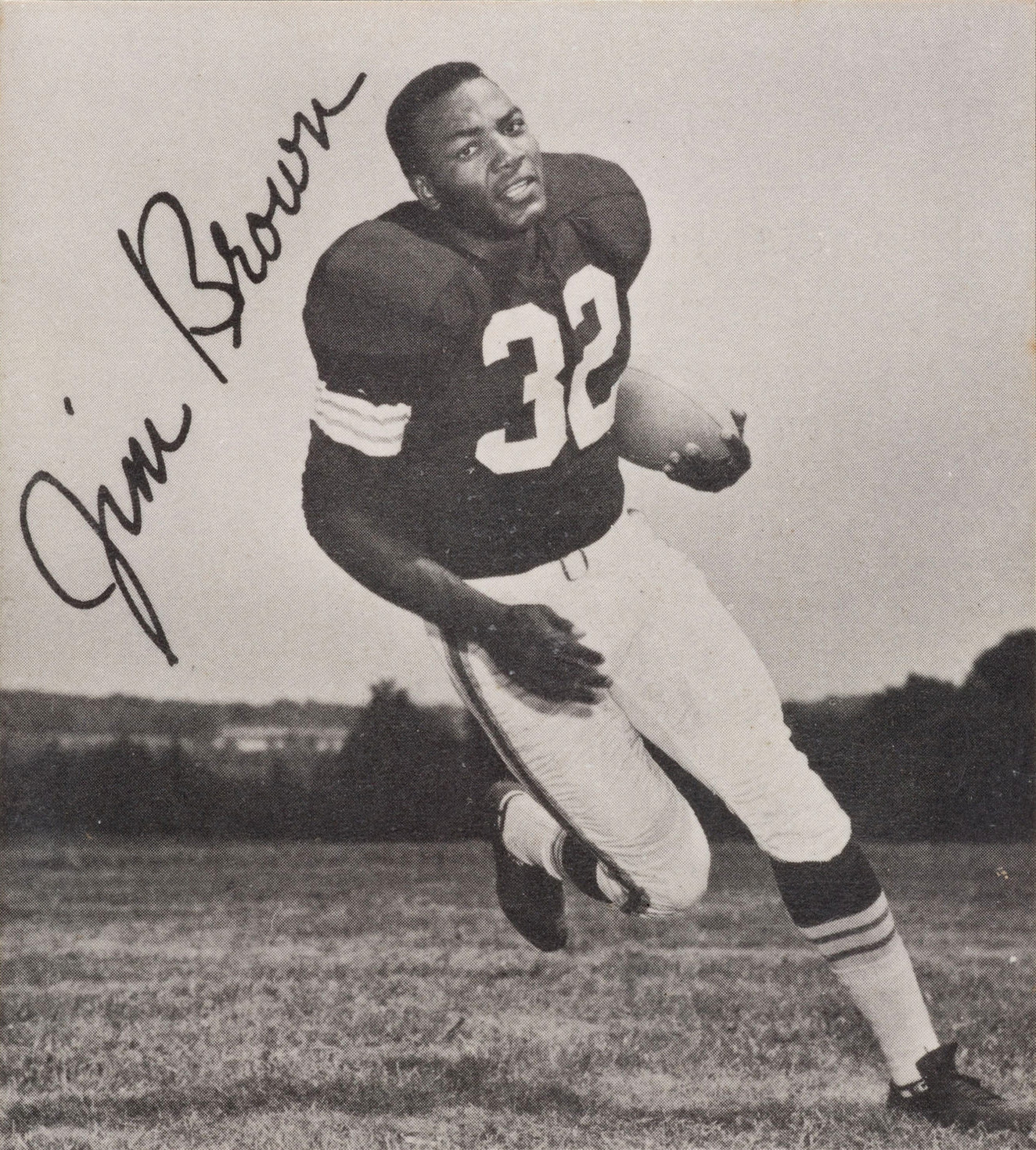 Jim Brown